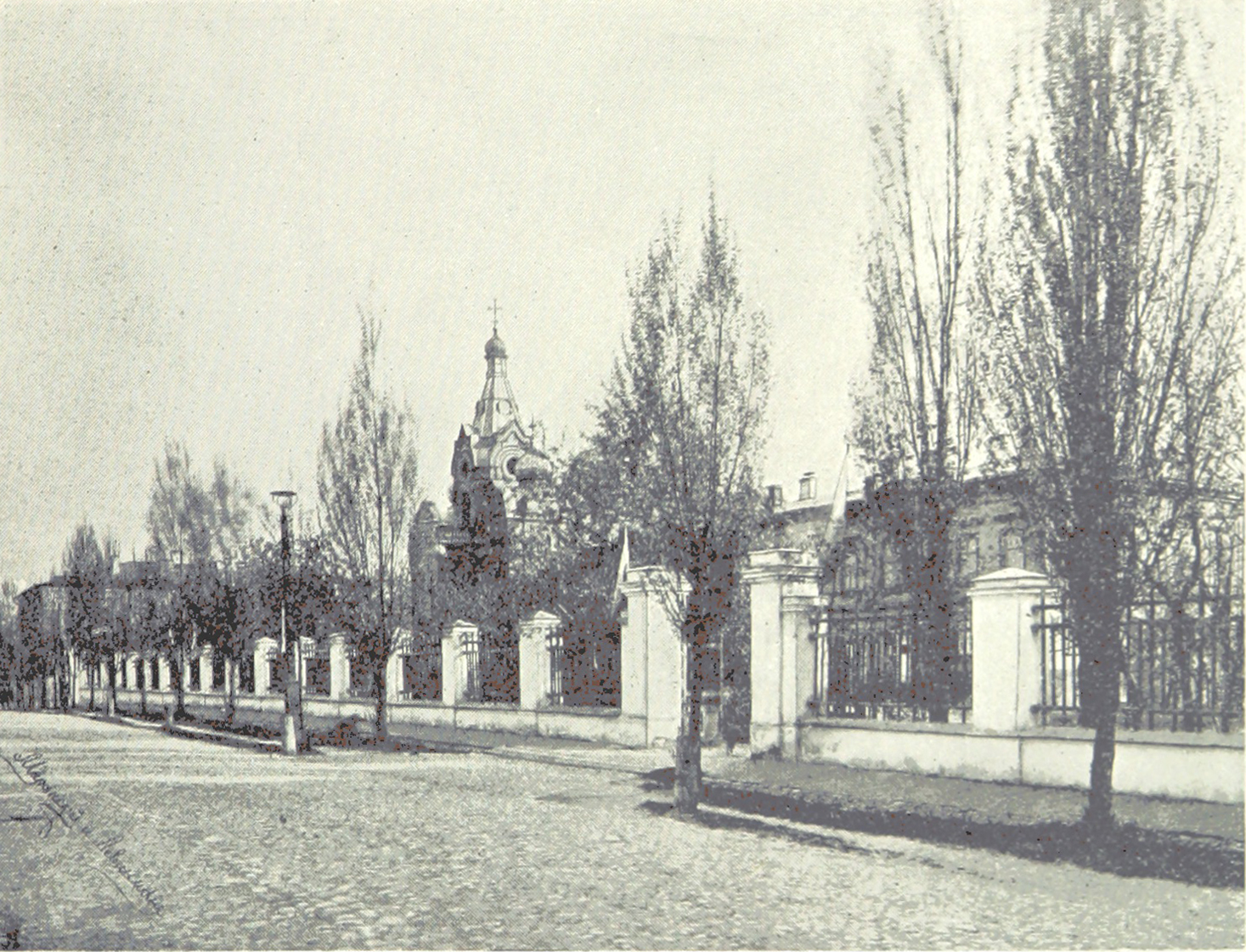 Беларуская (тарашкевіца): Менск (Miensk), Новае Места (Novaje Miesta). Архірэйскае падвор’е (Archirejskaje padvorje)